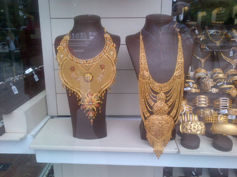 Dos collares en la vitrina de una joyeria en Kızılay, Ankara, Turquia.